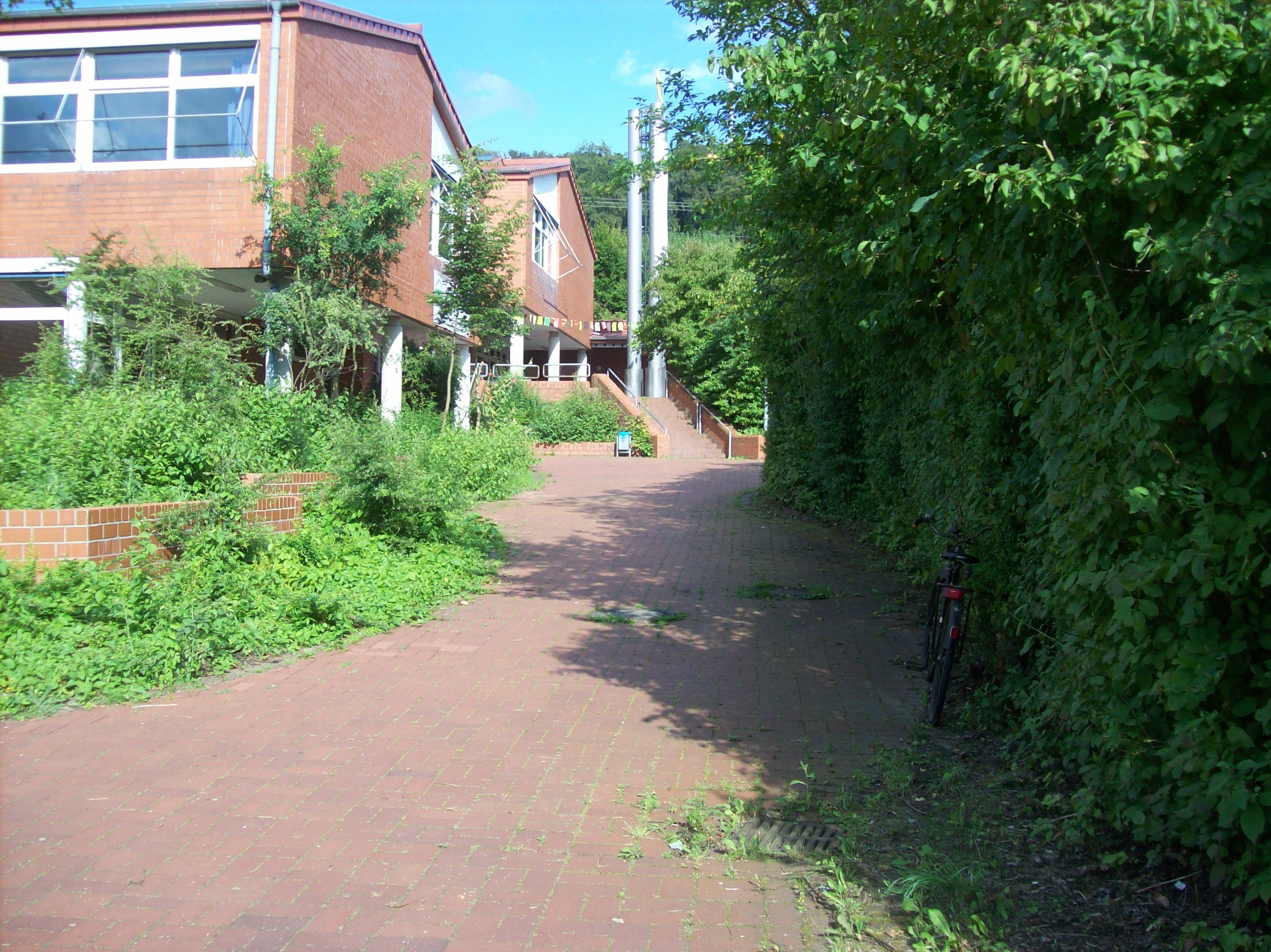 Blick auf die IGS in Bovenden, früher 'Schule am Osterberg'